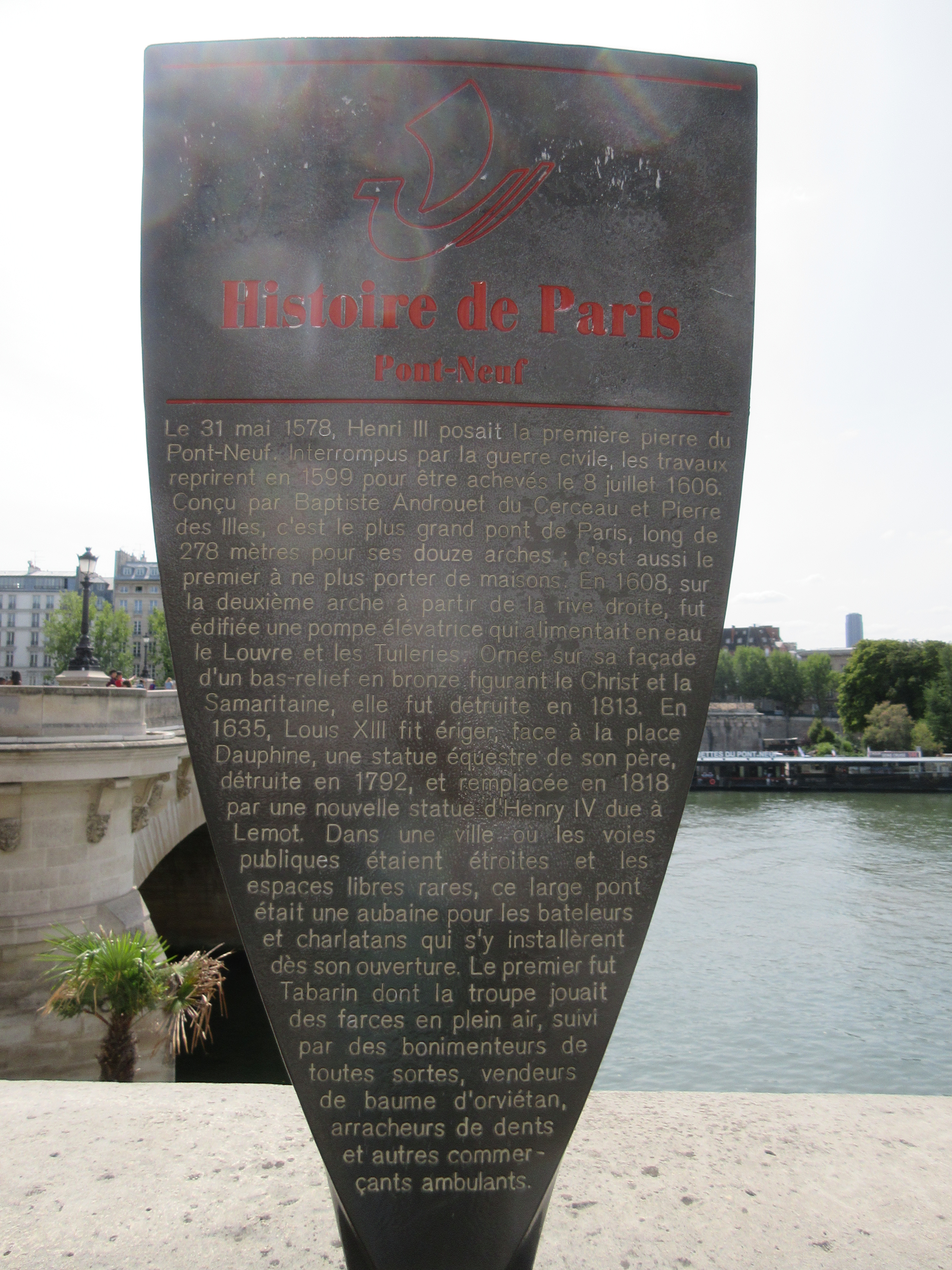 Panneau Histoire de Paris « Pont-Neuf » situé Quai du Louvre